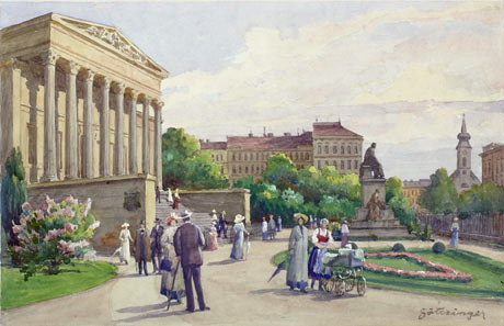 Hans Götzinger vízfestménye